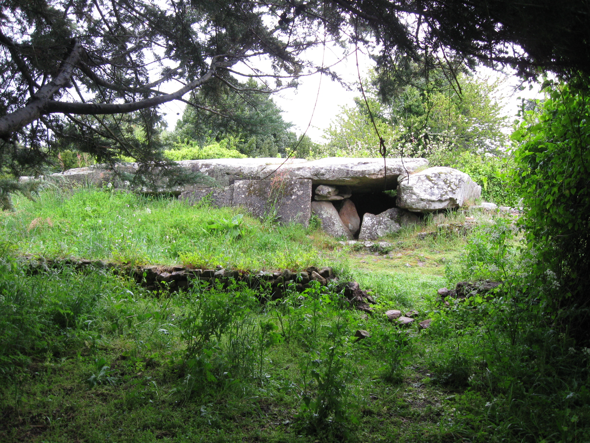 Dolmen von Mane Rethual bei Locmariaquer, Morbihan